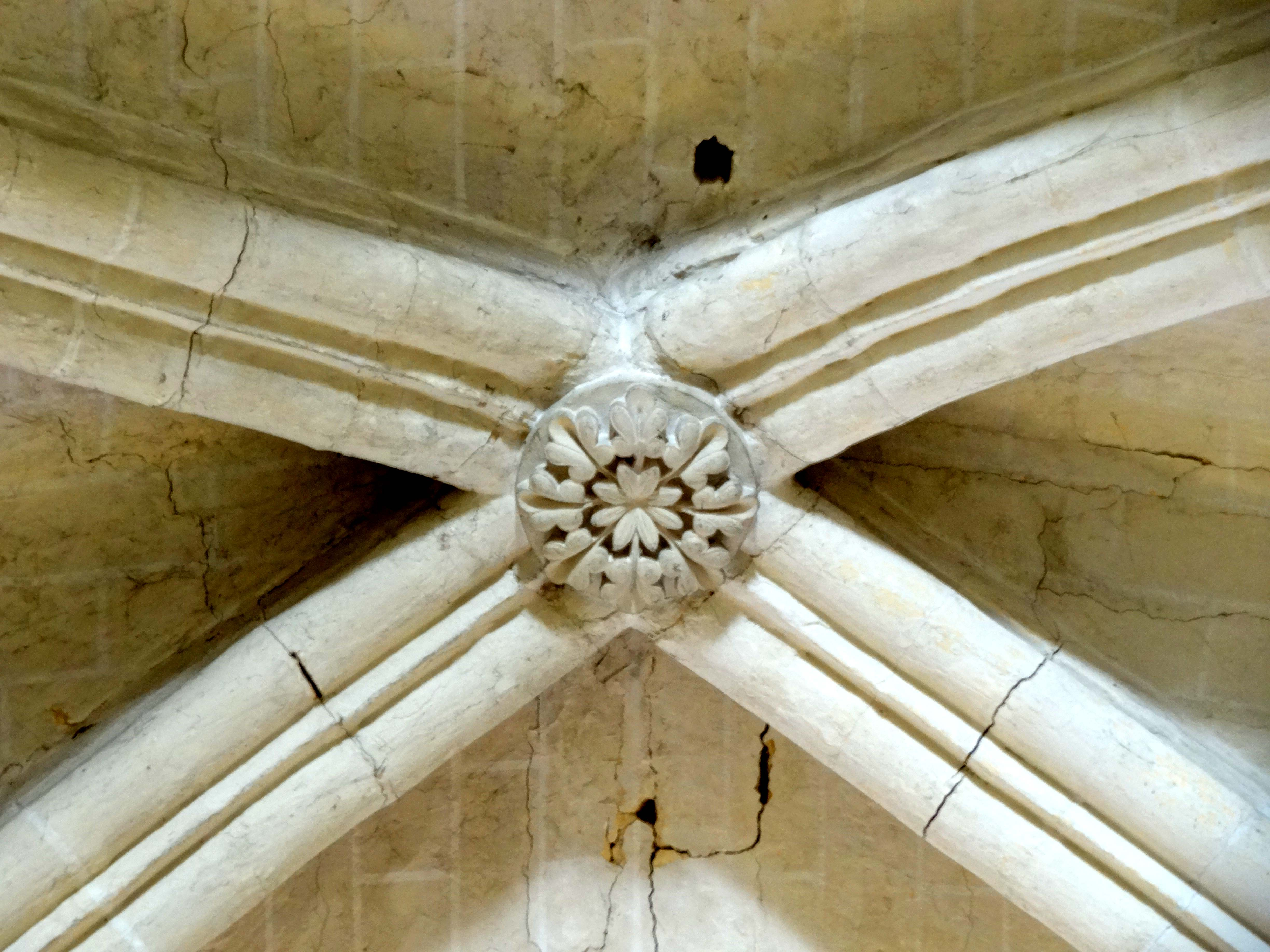 Intérieur de l'église - voir titre.